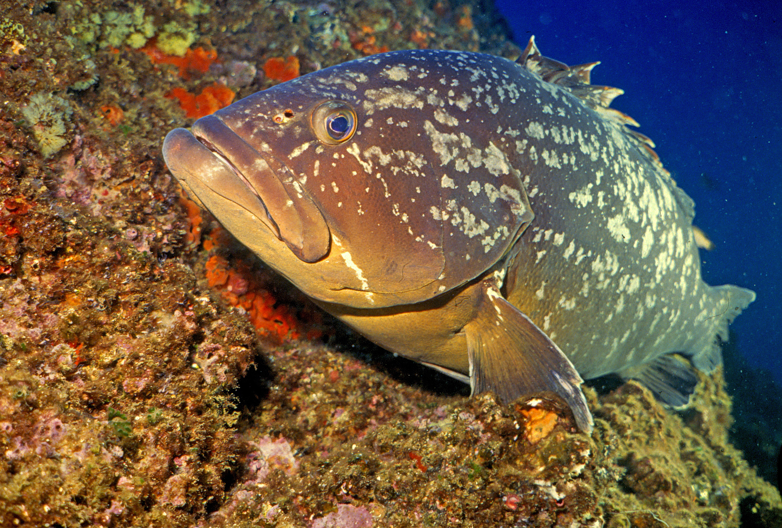 Epinephelus marginatus (Lowe, 1834) - Banyuls-sur-Mer, Sec de rédéris - 08/87. Le mérou naît femelle et meurt mâle, c'est la protogynie ou protérogynie, les organes génitaux femelles étant matures plus tôt que les organes génitaux mâles